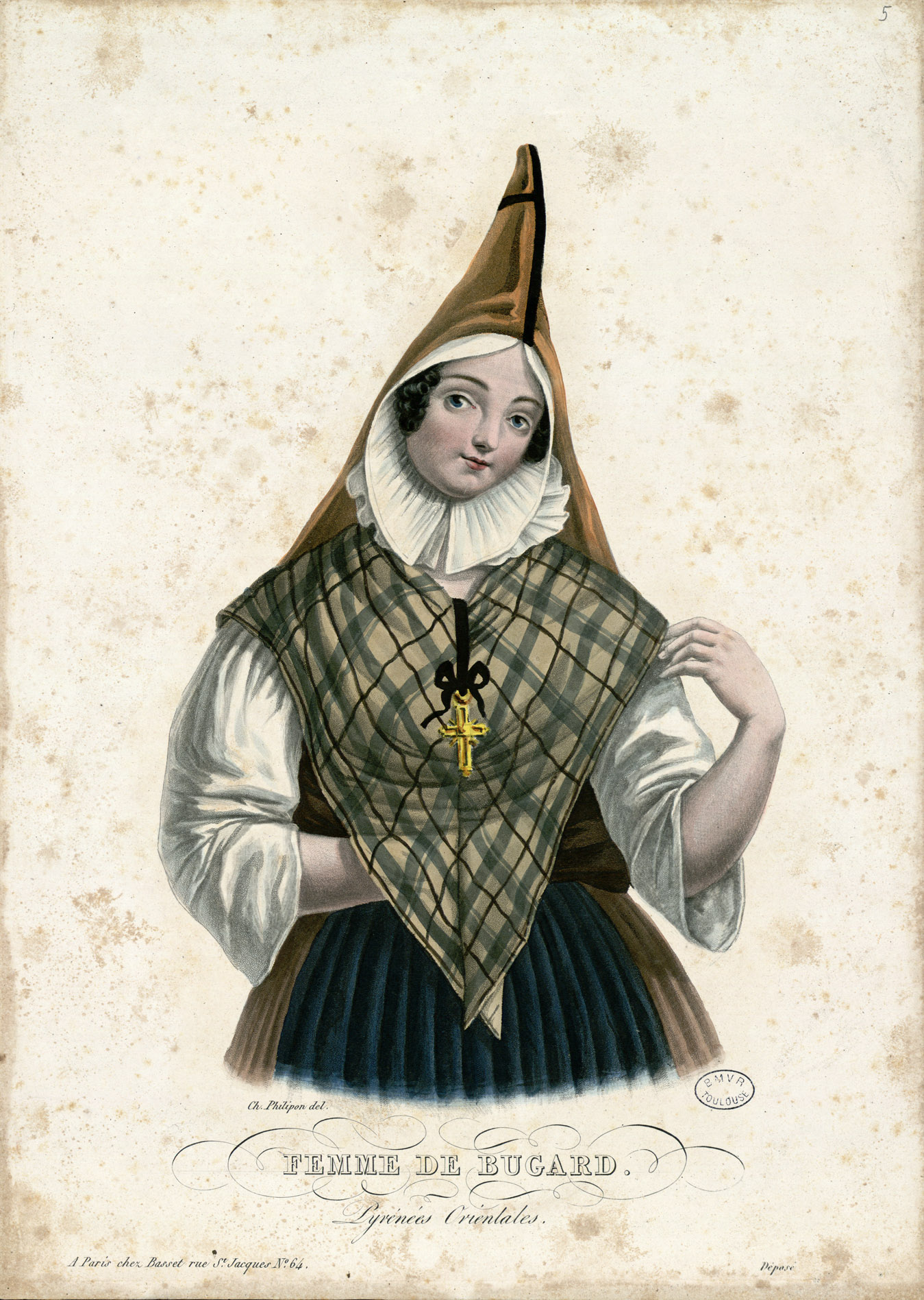 Ancely, René (1876 - 1966). Possesseur